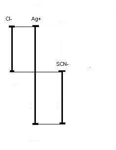 creer par alpha.prim le 29/06/06 Catégorie:Image de chimie